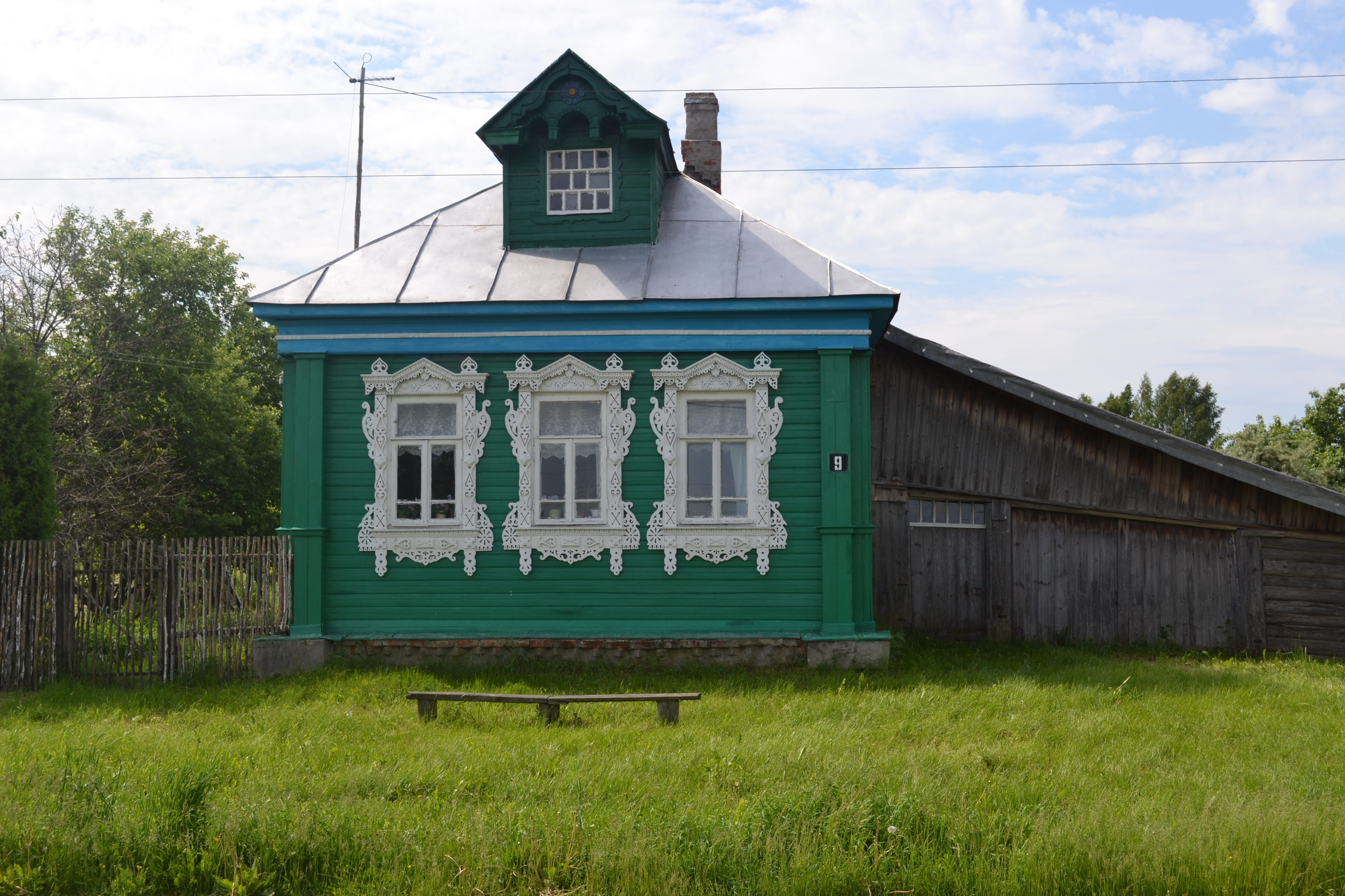 Ефремово (Шатурский район) 2